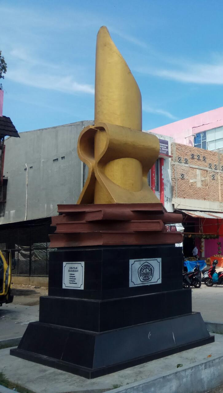 Tugu Adabiah di Pasar Raya Padang